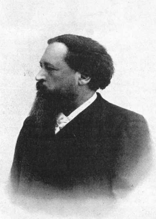 "Étienne Mairesse, rédacteur parlementaire, fondateur et président honoraire de l'association syndicale professionnelle des journalistes parlementaires".